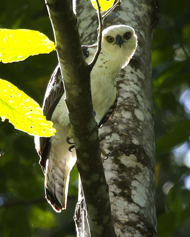 Sulawesi Hawk Eagle Spizaetus lanceolatus - Juvenile seen in jungle, Tangkoko Nature Reserve, North Sulawesi, Indonesia Date :9 July 2006 Names: Celebes hawk eagle, Celebes Hawk-Eagle, Sulawesi Hawk-Eagle Indonesian name: Boankwéa, Bunéapada, Elang Sulawesi jambul